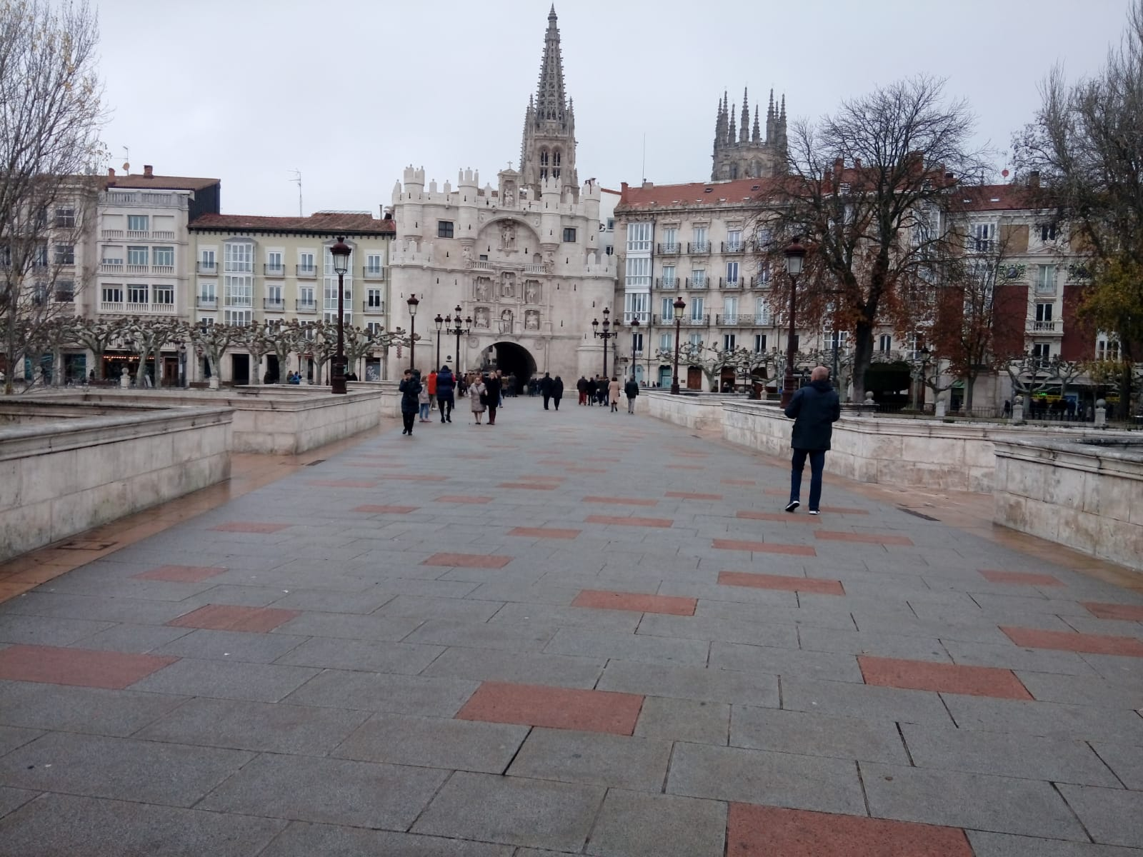 Foto del puente de Santa María situado en la ciudad burgalesa.